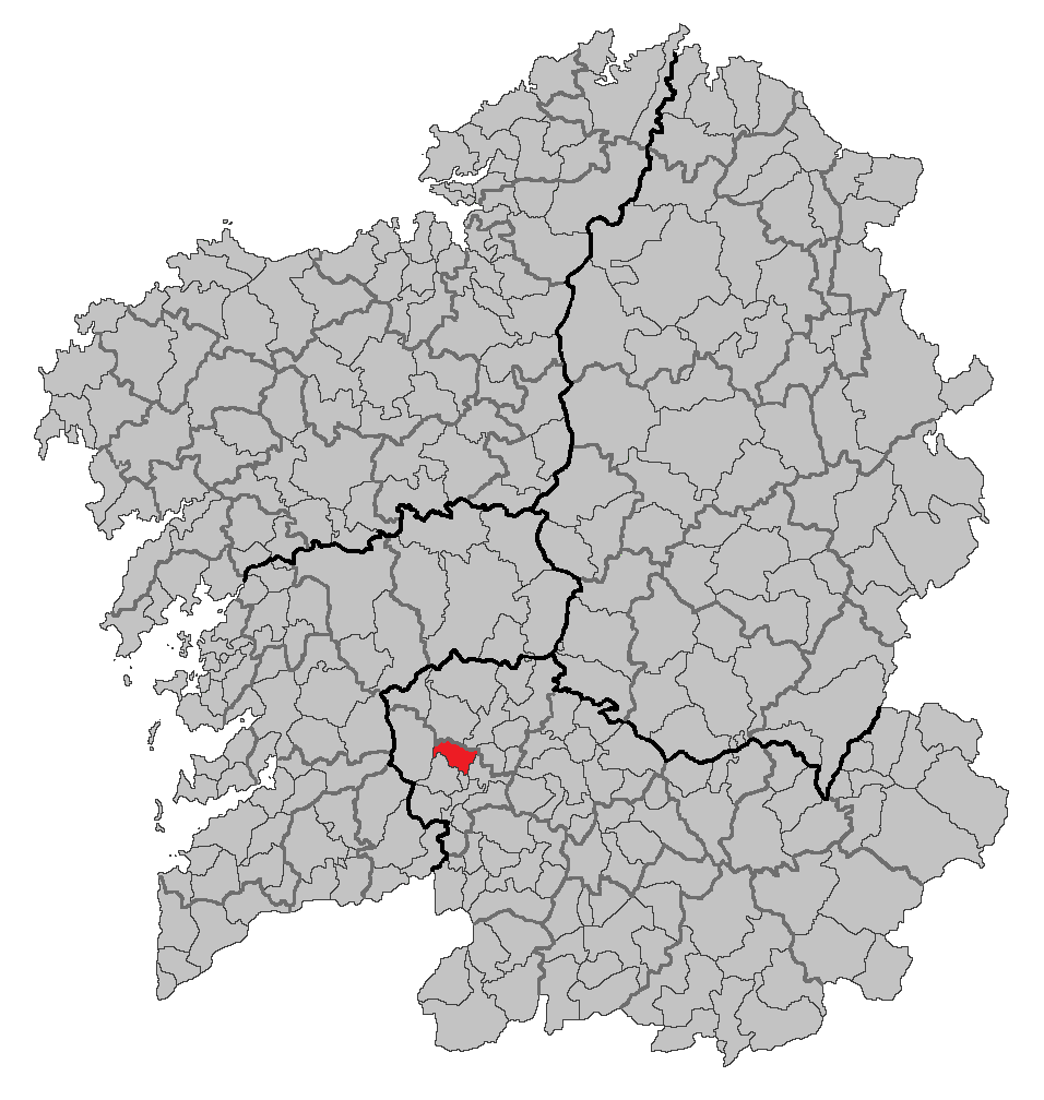 Mapa coa localización do concello de Leiro.